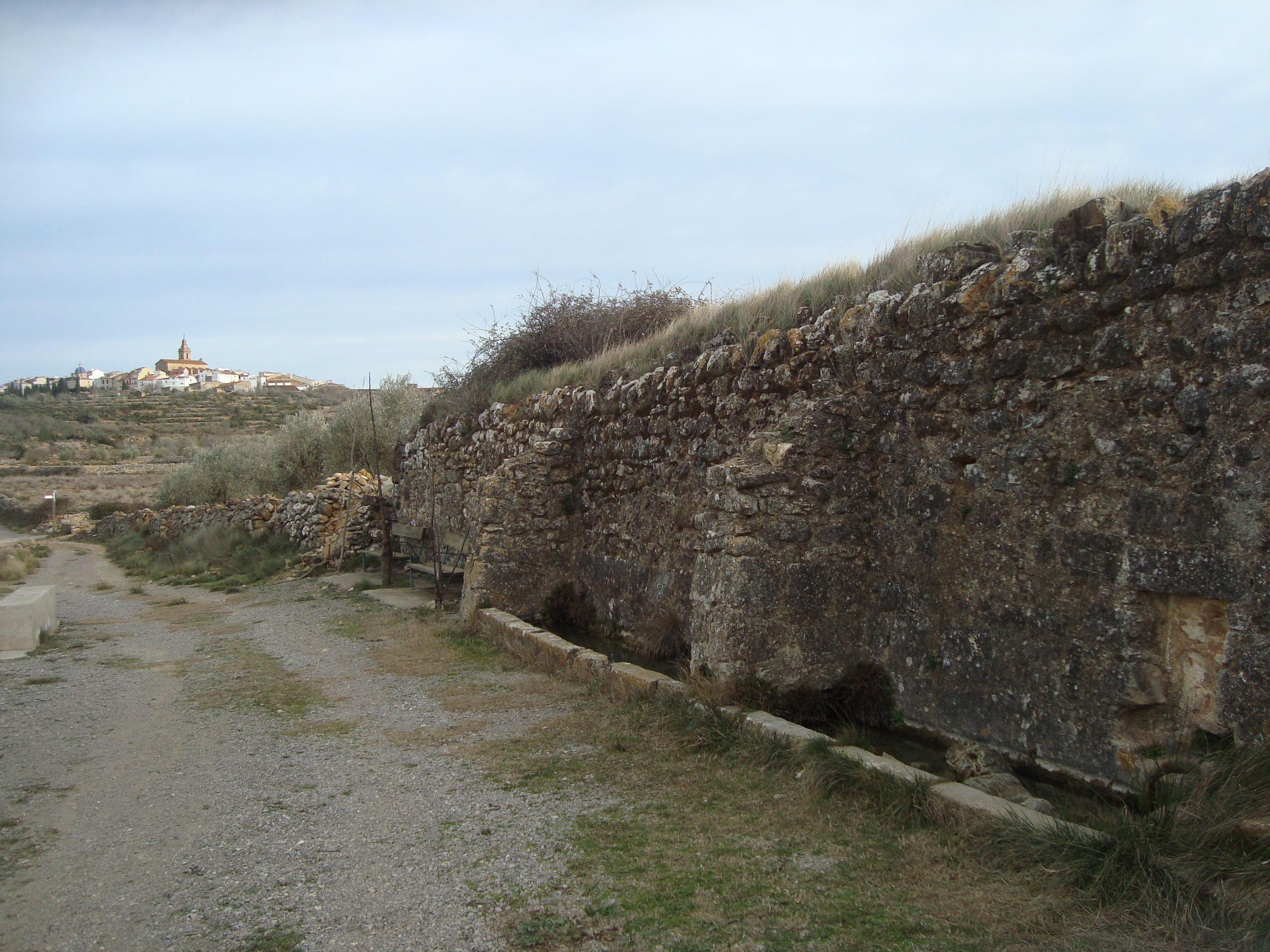 Fuente de la Vila o font dels Terrers, Villanueva d'Alcolea